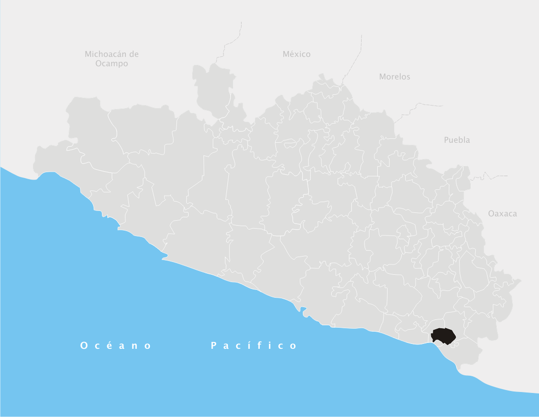 Juchitán en el estado de Guerrero (México)